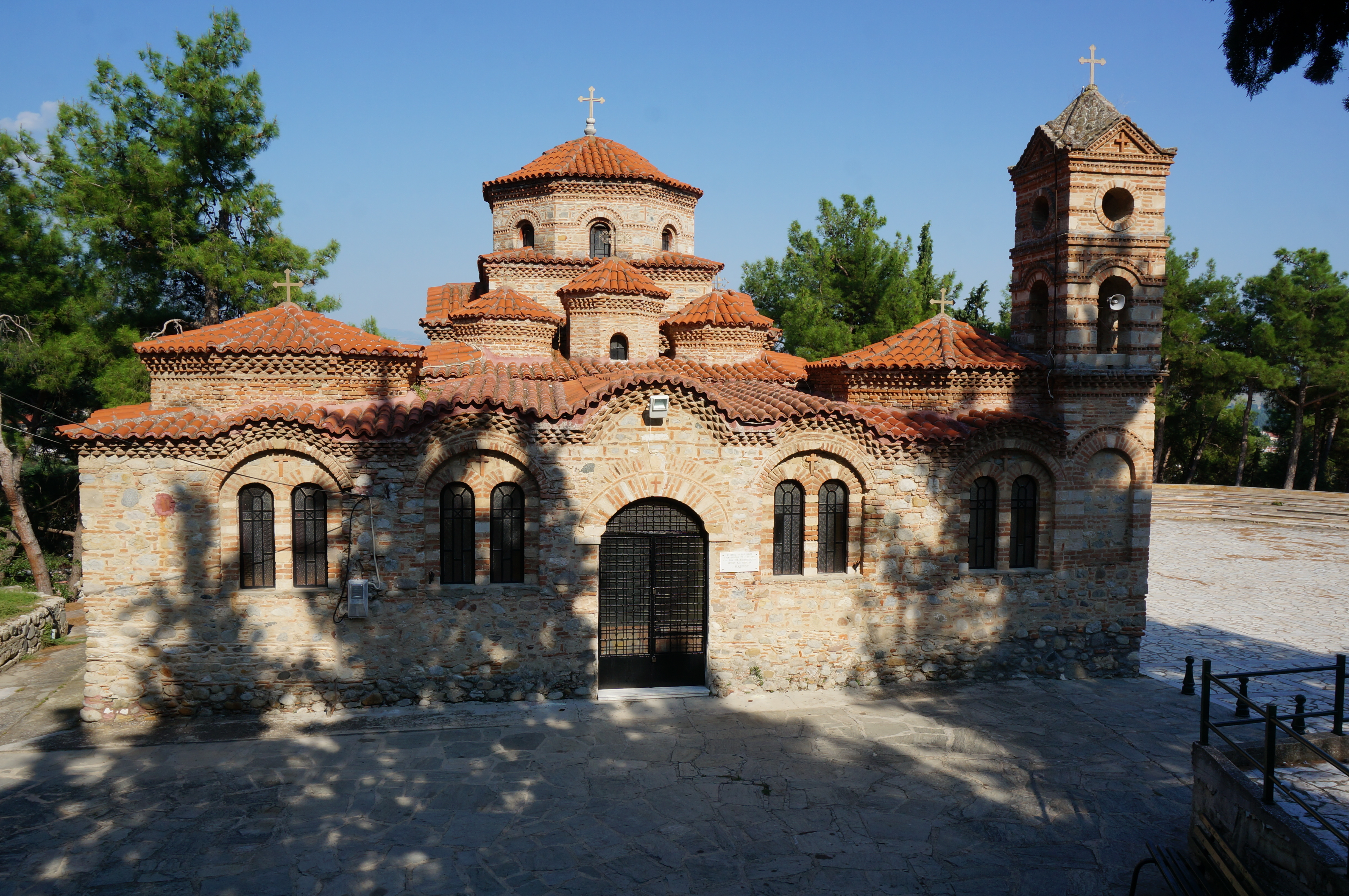 à Serres.